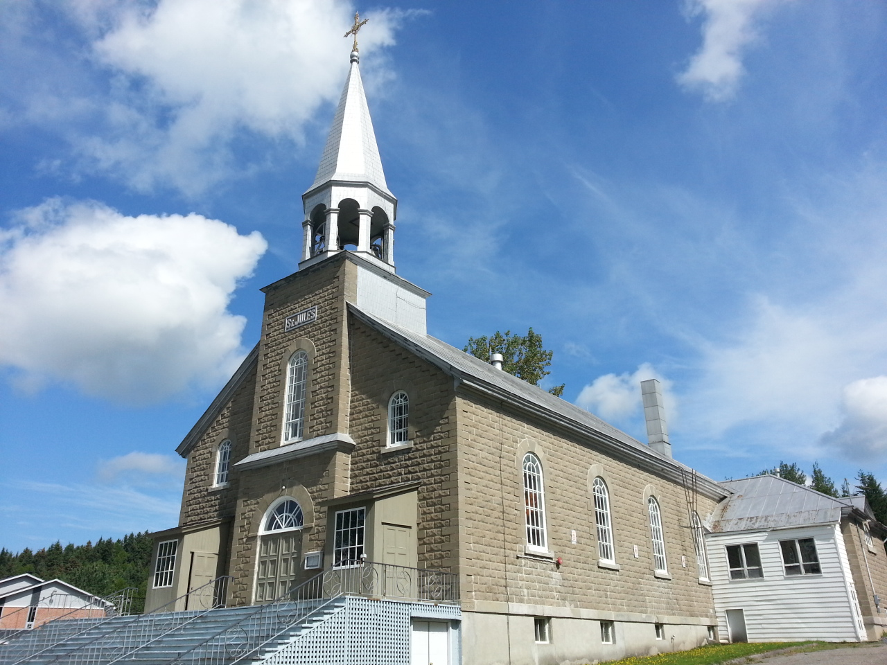 Église de Saint-Jules, municipalité de paroisse du Québec située dans la MRC de Robert-Cliche dans la Chaudière-Appalaches.